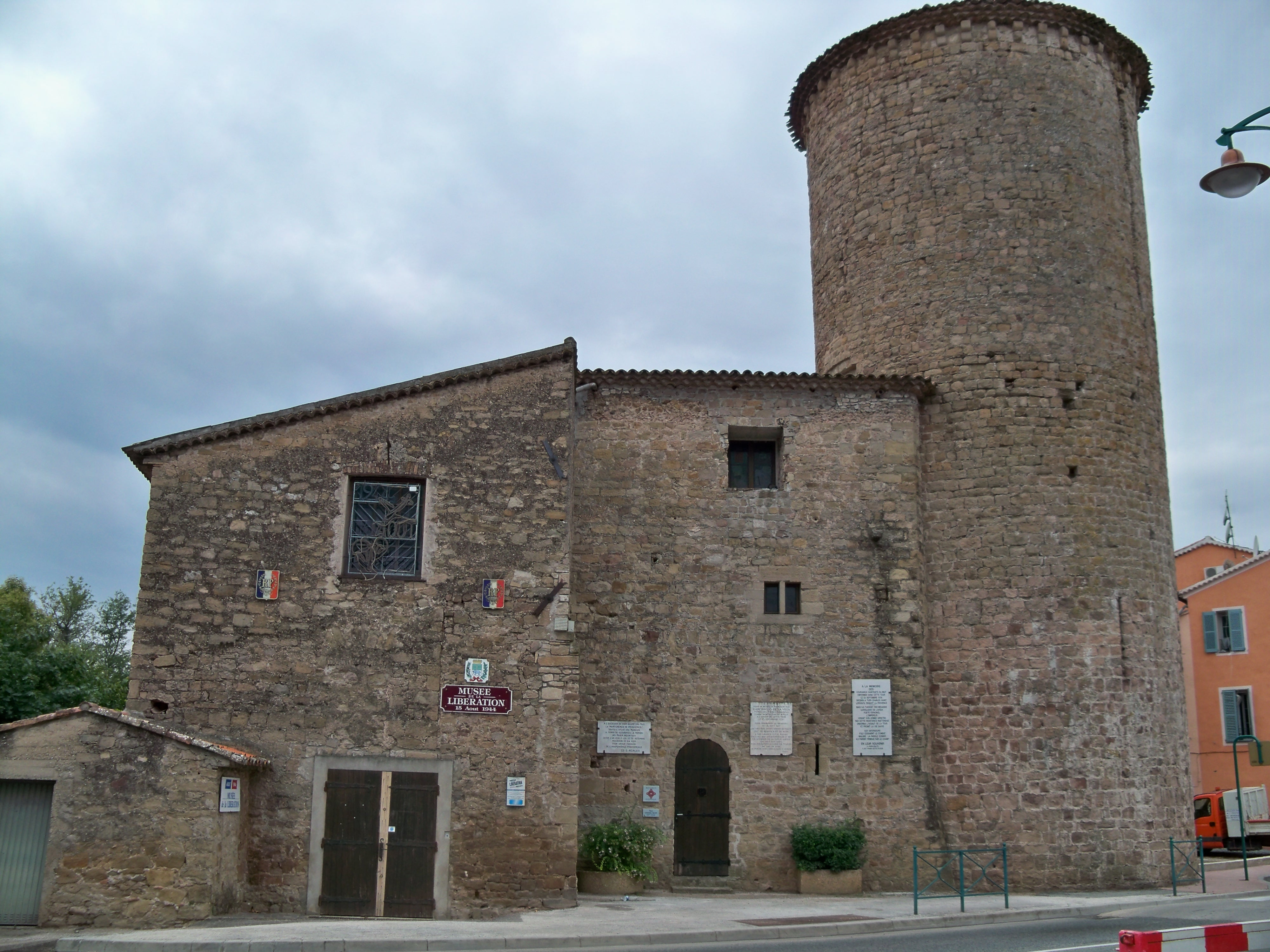 Tour Charles Quint, actuellement musée de la libertation et du débarquement de Provence